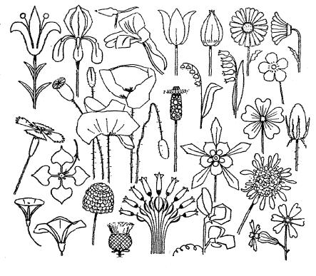 وحدات زخرفية نباتية مستوحاة من الطبيعة